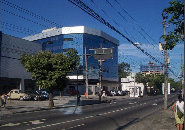 Campo Grande -RJ